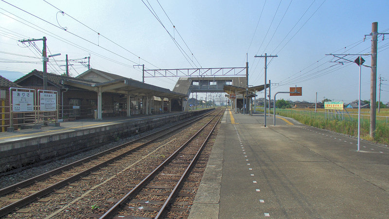 JR鹿児島本線有佐駅 構内 写真手前が熊本駅方面。 撮影者/著者/著作権保有者 : MK Products (本人がアップロード) 撮影日 : 2007/10/05 有佐駅用にアップロードした画像です。良い画像があれば別の画像に変えてください。